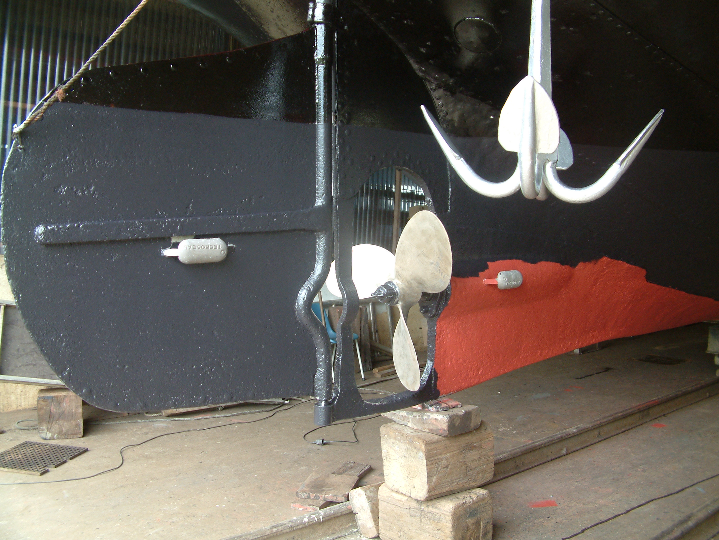 De hak onderaan het schroefraam, met de roerkoning en de schroef